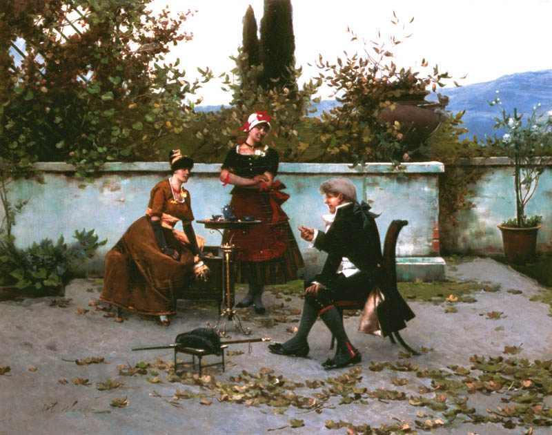 Na tarasie - olej, płótno